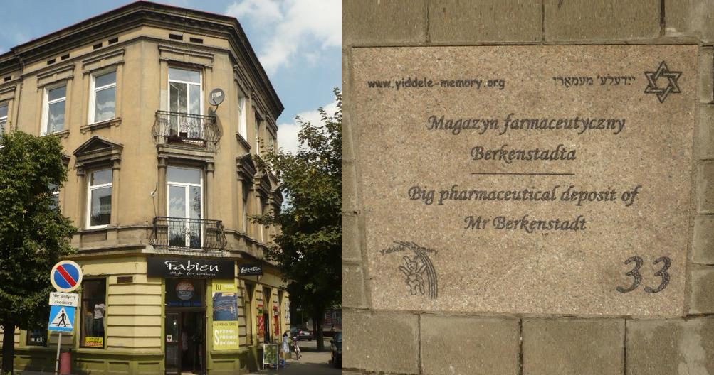 Radomsko. Otwarte Muzeum Żydowskie 33